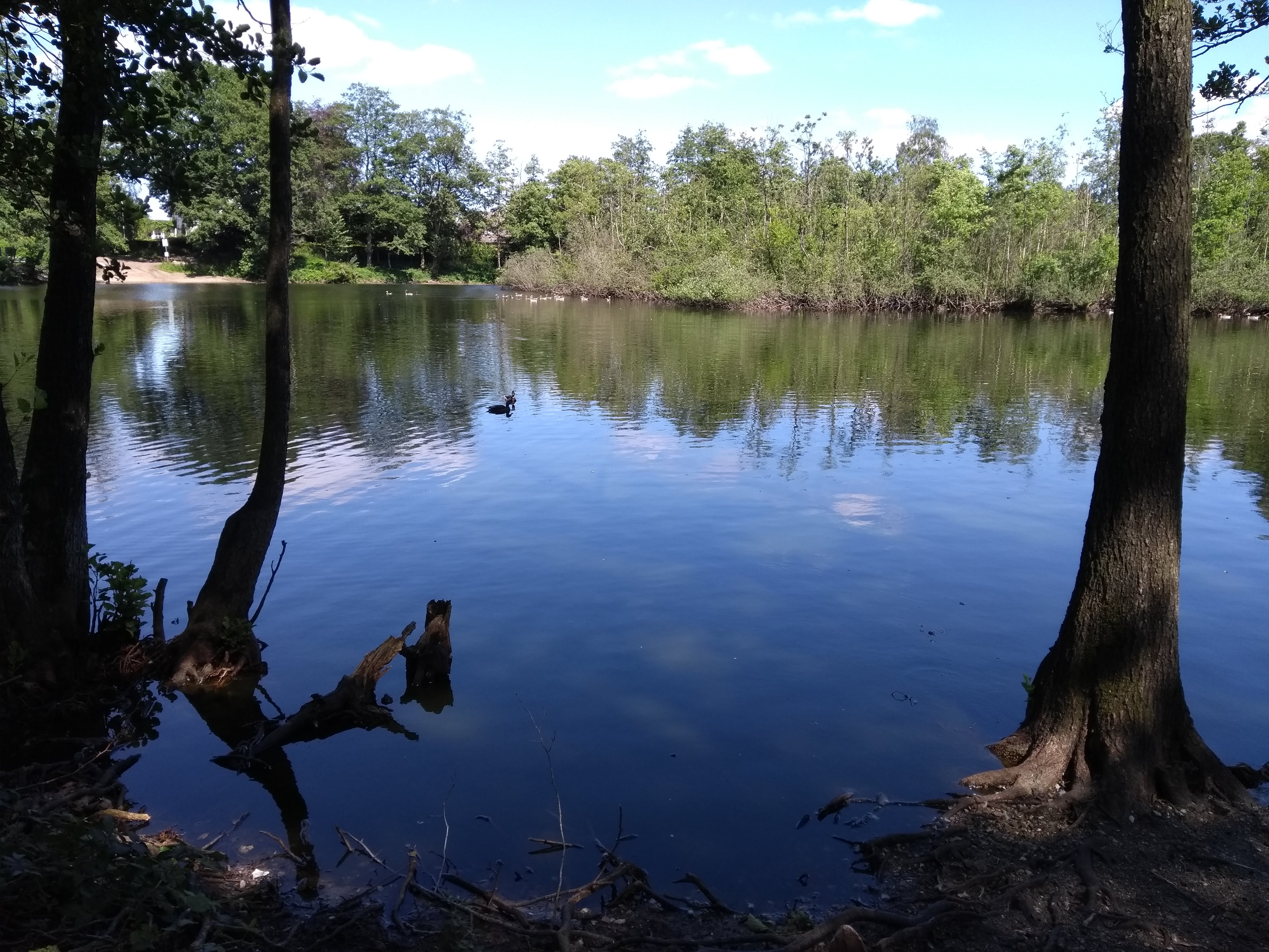 Thorberger Moor bei Süderbrarup